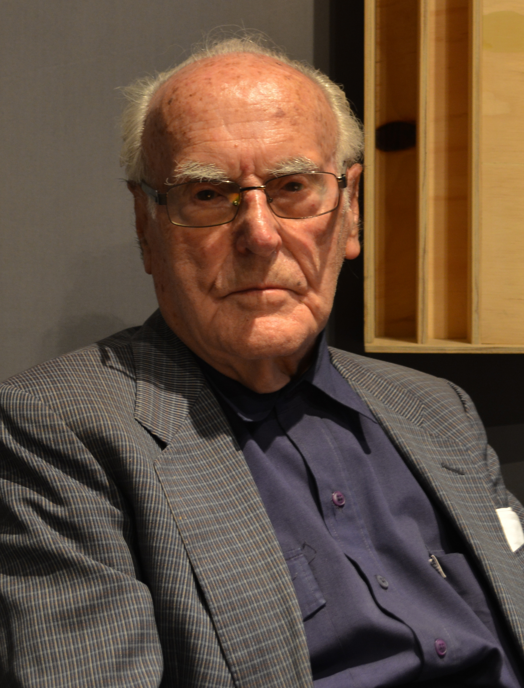 Víctor Pey Casado (n. Madrid, 31 de agosto de 1915), ingeniero catalán y exdirector del diario Clarín.